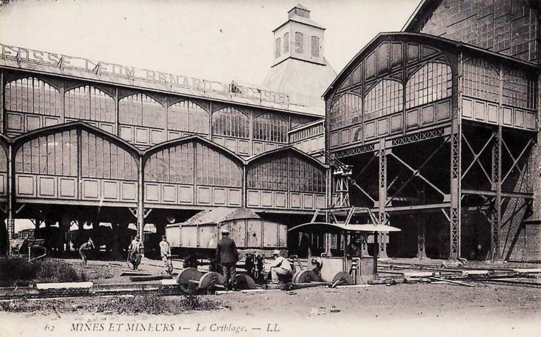 La fosse n° 8 - 8 bis de la Compagnie des mines de Nœux était un charbonnage du bassin minier du Nord-Pas-de-Calais constitué de deux puits situé à Verquin, Pas-de-Calais, Nord-Pas-de-Calais, France.